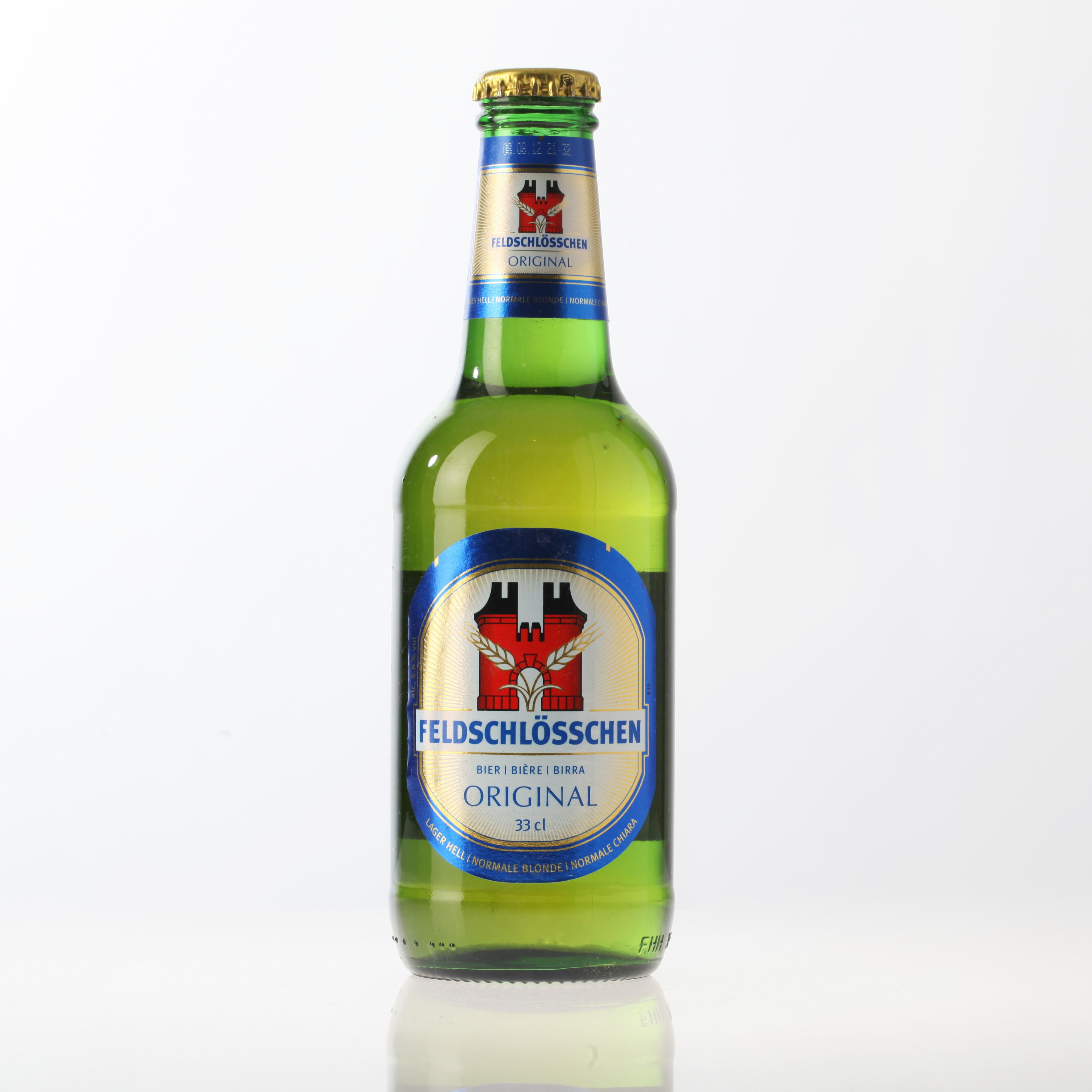 Feldschlösschen Bier aus Flasche